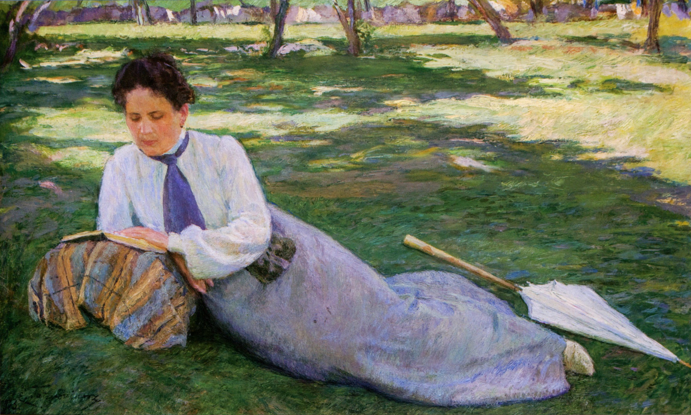 Картина «Женщина, читающая в саду (Портрет Жюстины, жены художника)»